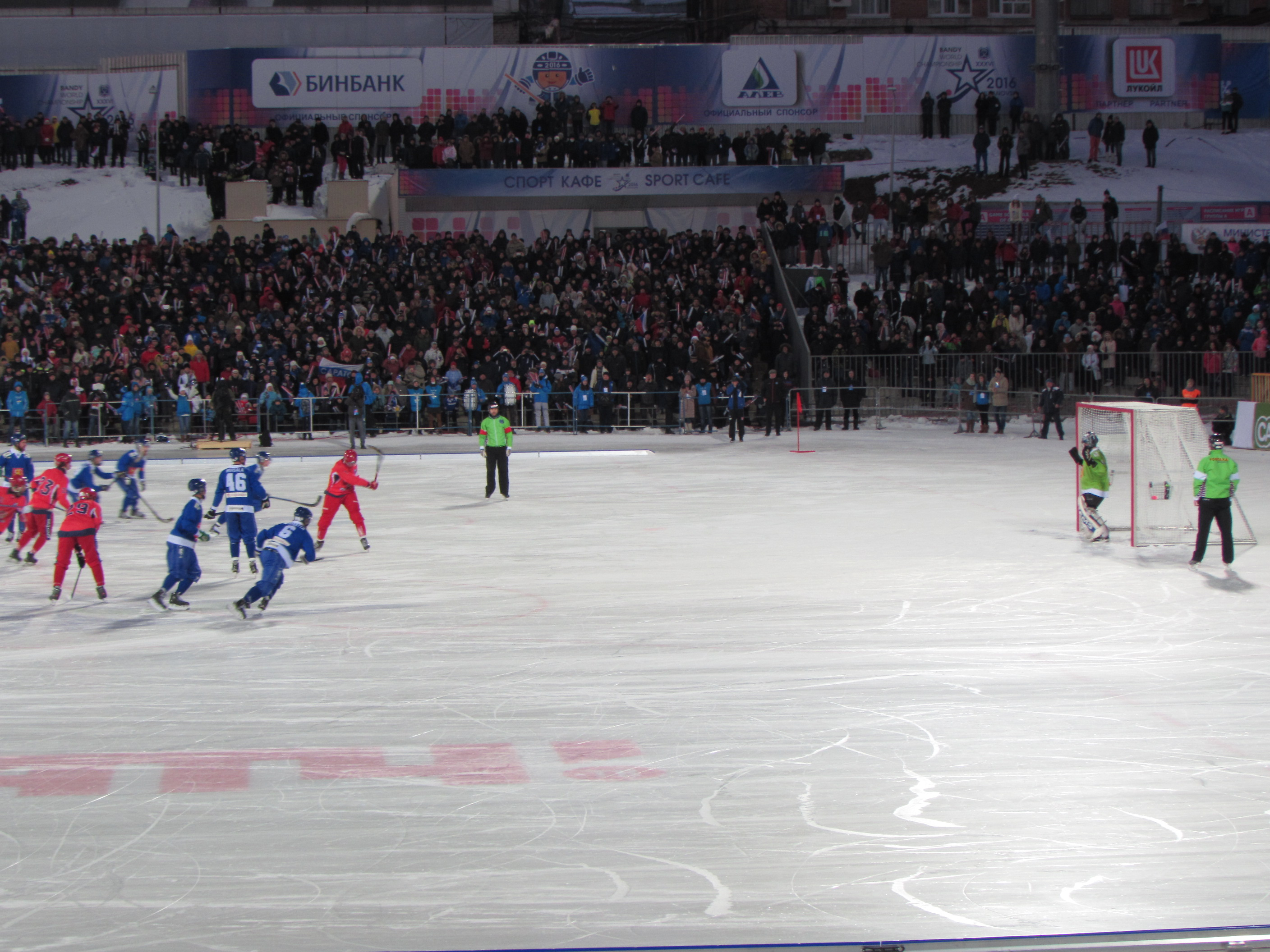 Фінал Росія – Фінляндія 2016 р.